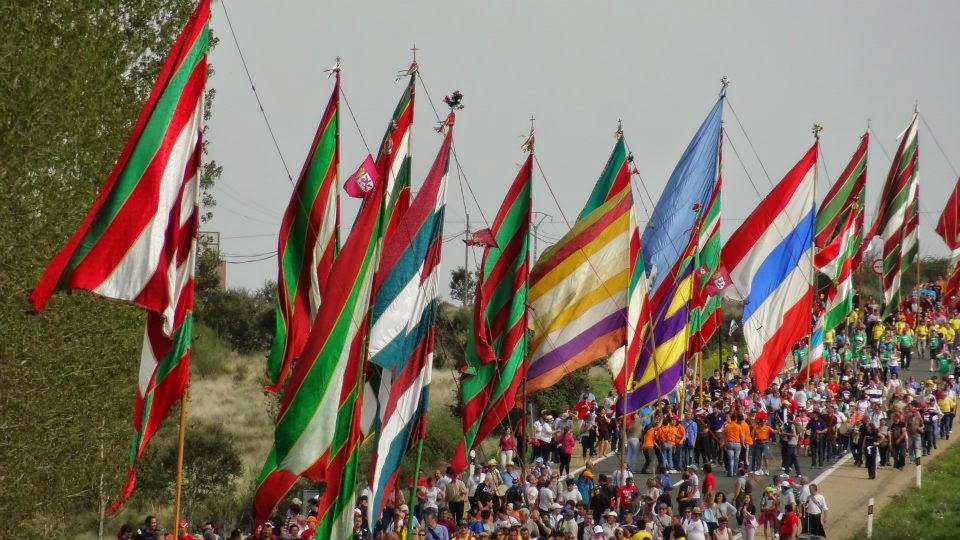 Una de las romerías más congregadas en la provincia leonesa